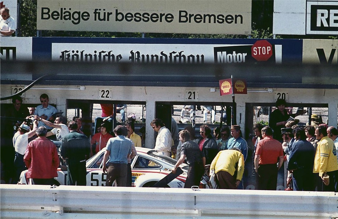 Jürgen Neuhaus (hinter dem Wagen stehend mit Sonnenbrille) übergibt den Porsche Carrera RSR beim 1000-km-Rennen auf dem Nürburgring an Paul Keller